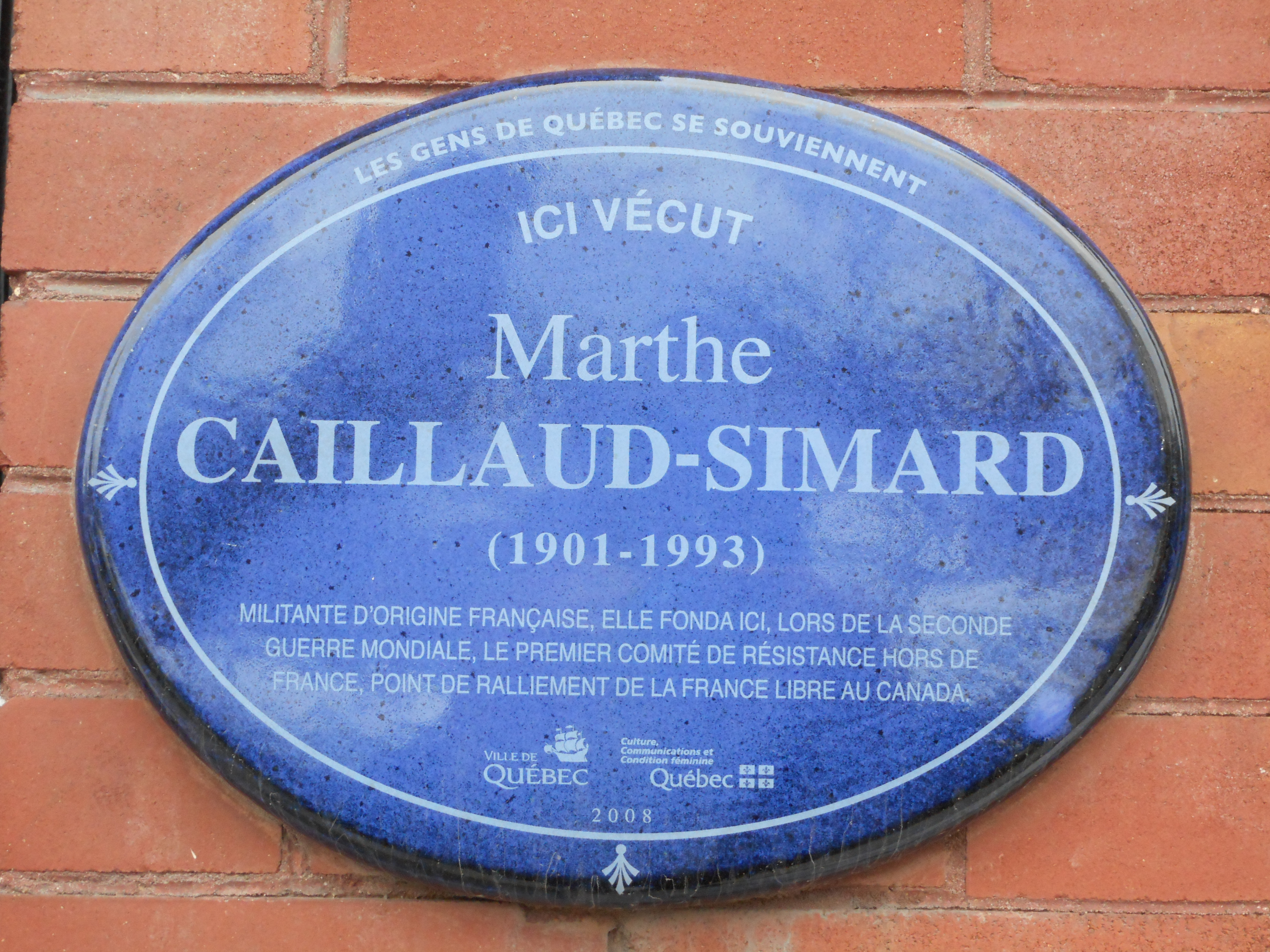 Plaque apposée sur la maison située au 59, rue D'Auteuil, Québec Texte de la plaque « Ici vécut Marthe Caillaud-Simard (1901-1993) Militante d'origine française, elle fonda ici, lors de la Seconde Guerre mondiale, le premier comité de résistance hors de France, point de ralliement de la France libre au Canada. »